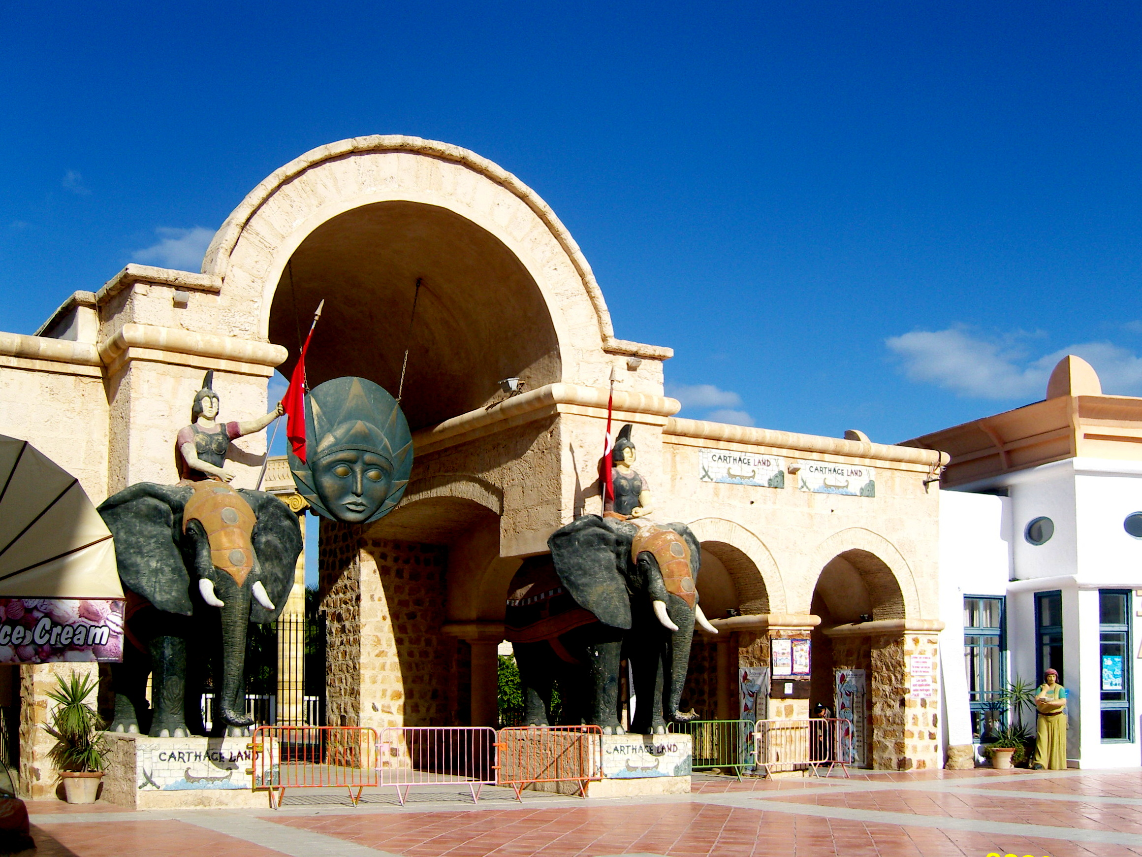 Entrée du parc d'attraction Carthage Land à Yasmine Hammamet